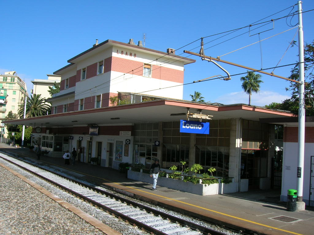 La stazione di Loano